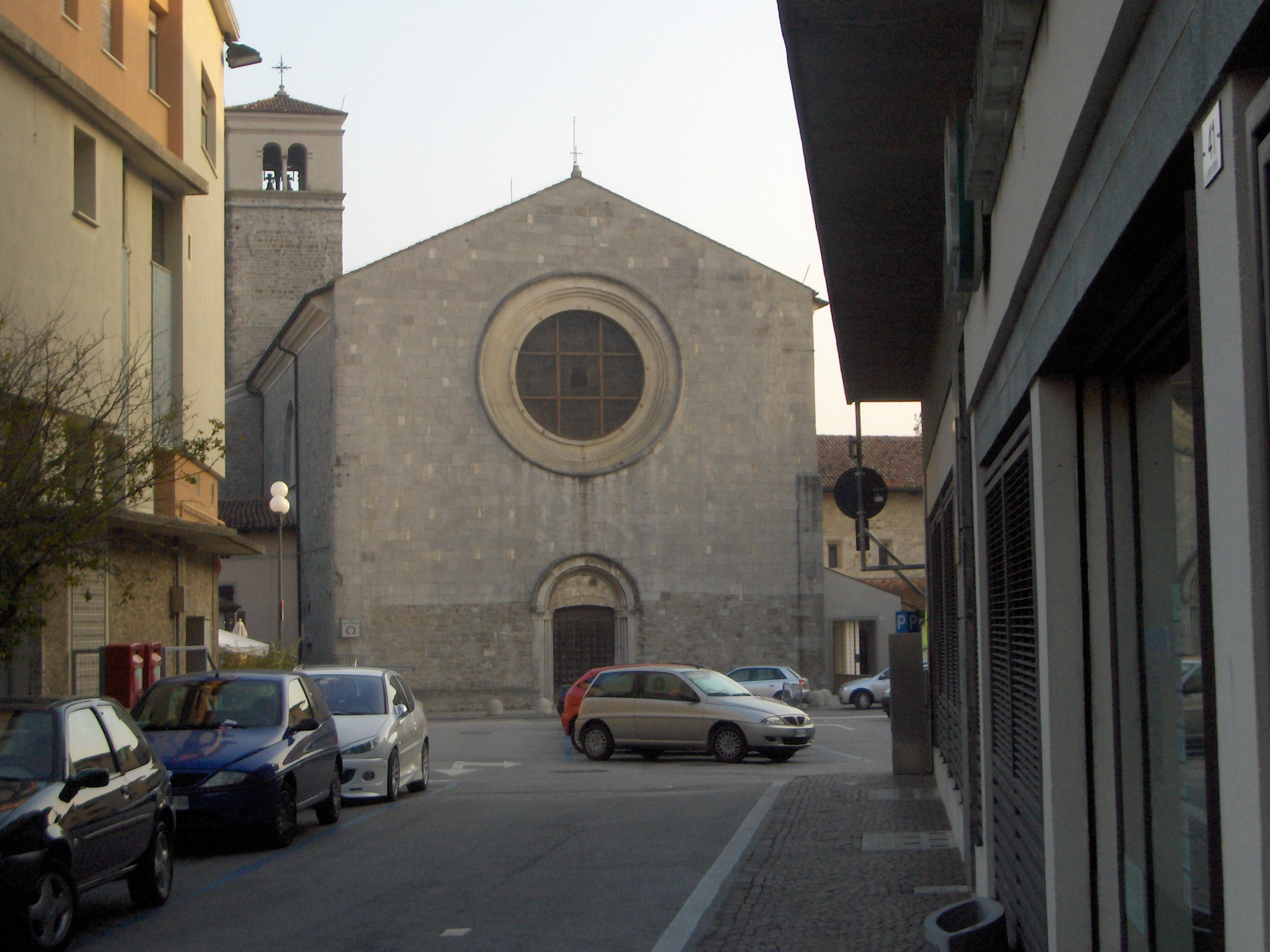 Cividale del Friuli, La chiesa sconsacrata di San Francesco. Foto di Sebi1.